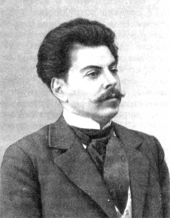 Николай Николаевич Брешко-Брешковский (1874-1943)